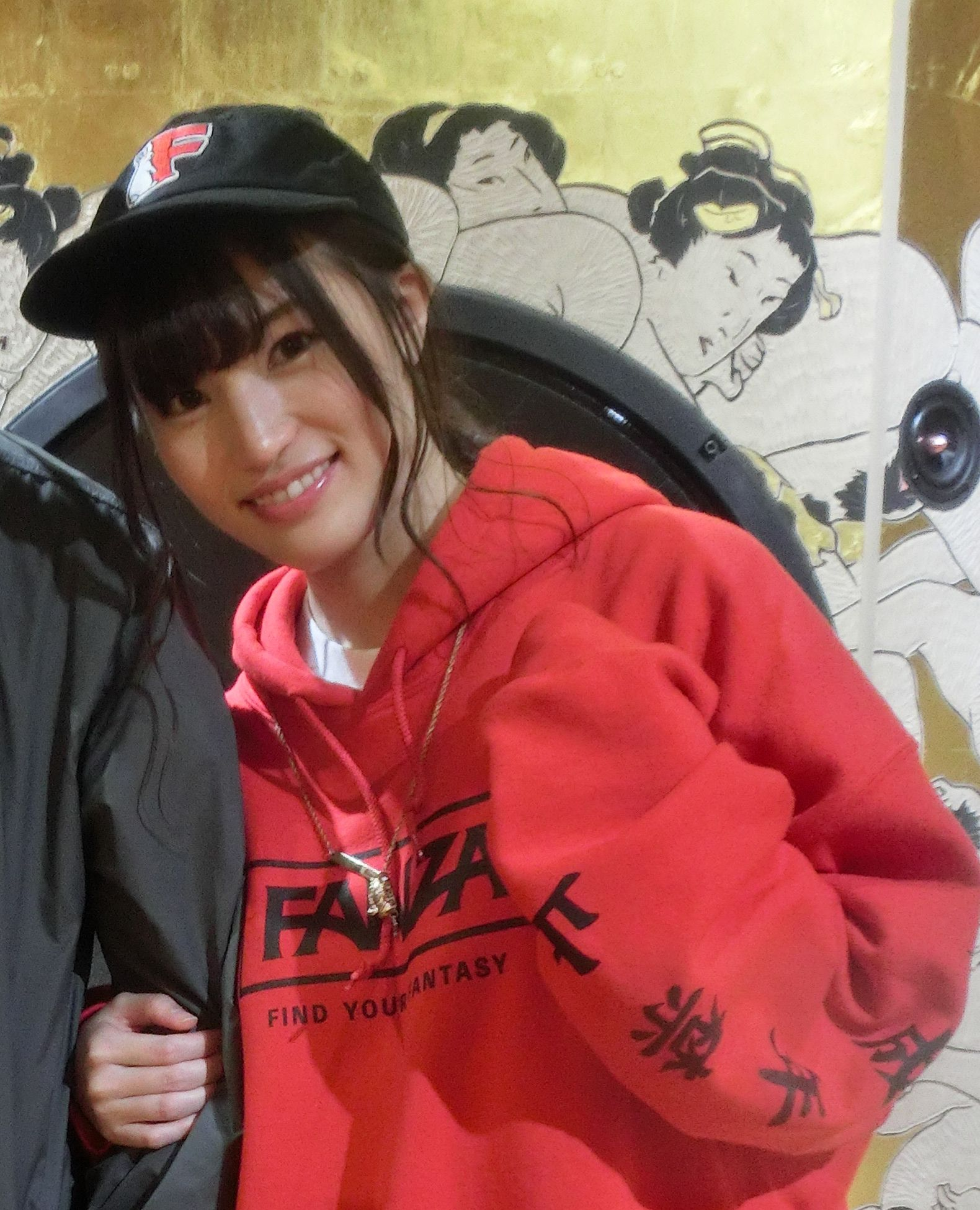 SHOKO TAKAHASHI